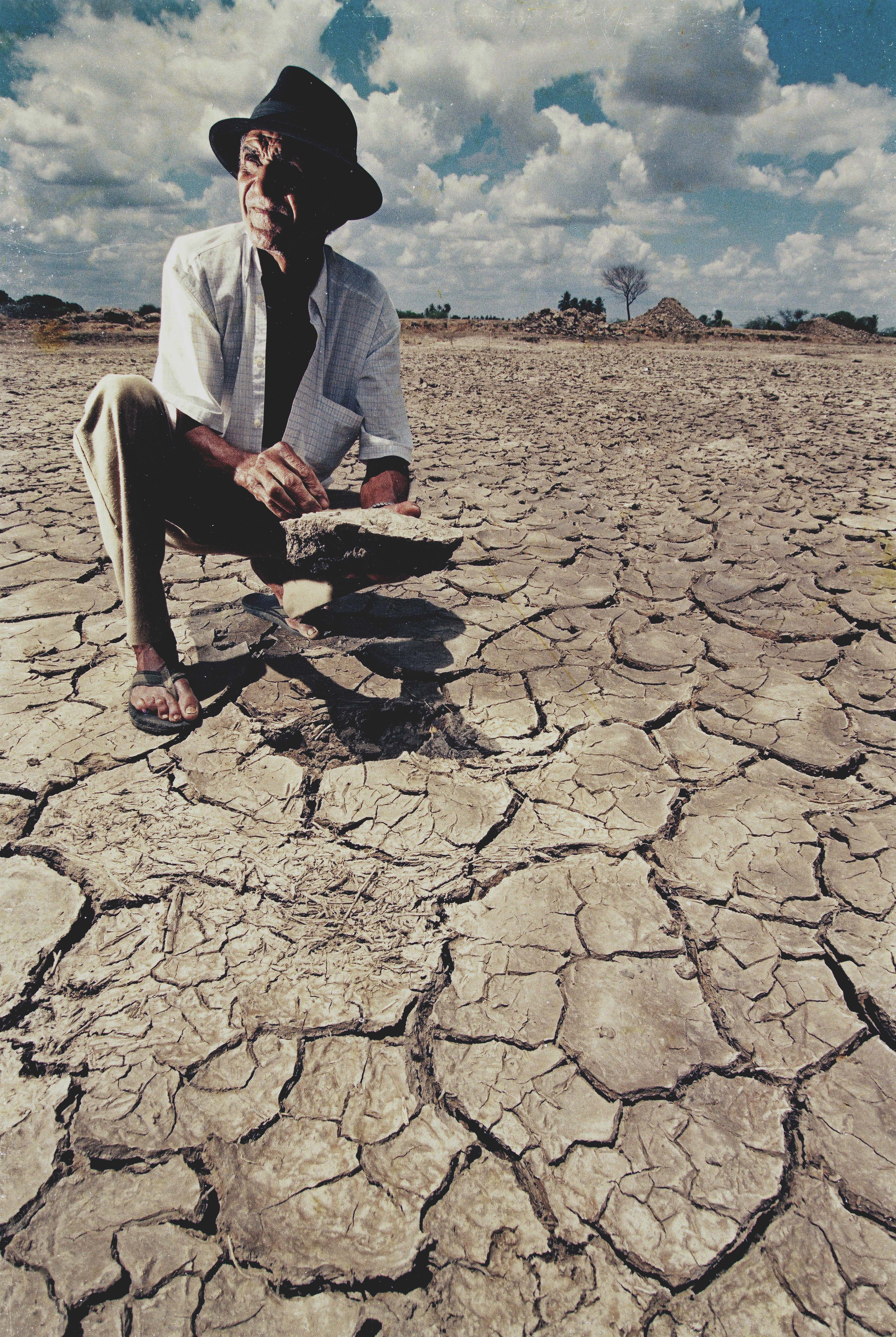 Desertificação no Brasil